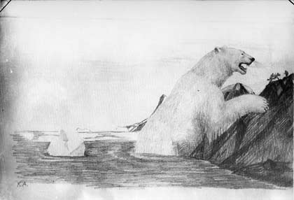 Mythic giant polar bear in arctic Greenland drawn by by Kârale Andreassen.